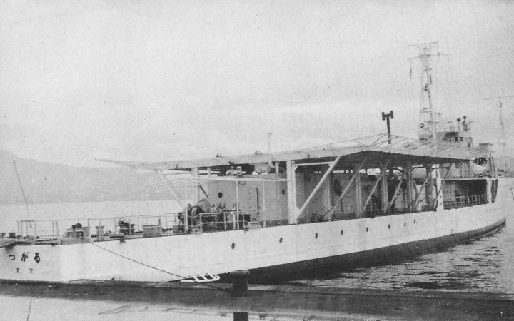 石油開発公団宿泊船『つがる』（元日本海軍海防艦『新南』、前海上保安庁巡視船『つがる』）、撮影場所不明